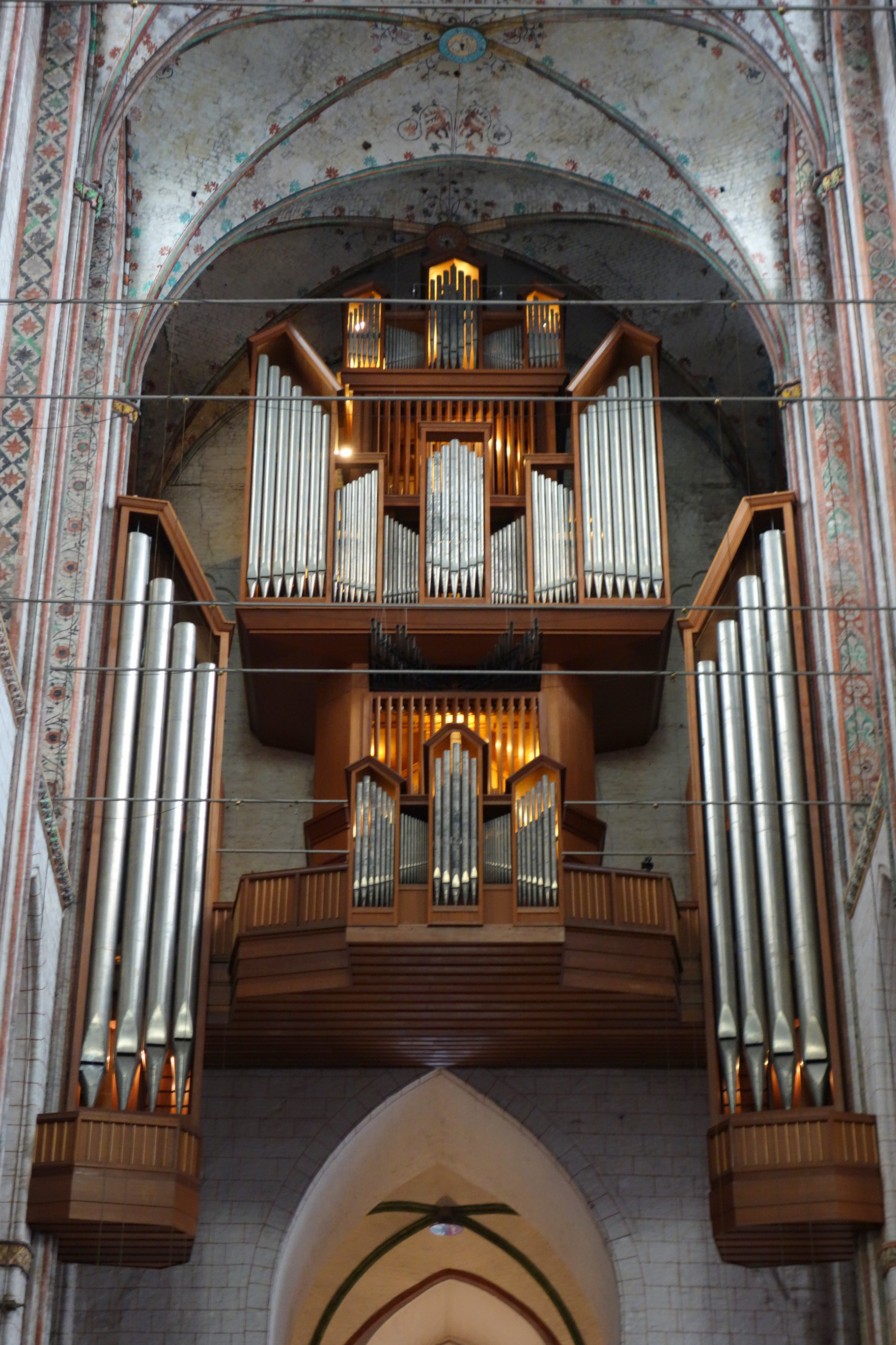 Kemper-Orgel von St. Marien, Lübeck, Schleswig-Holstein, Deutschland